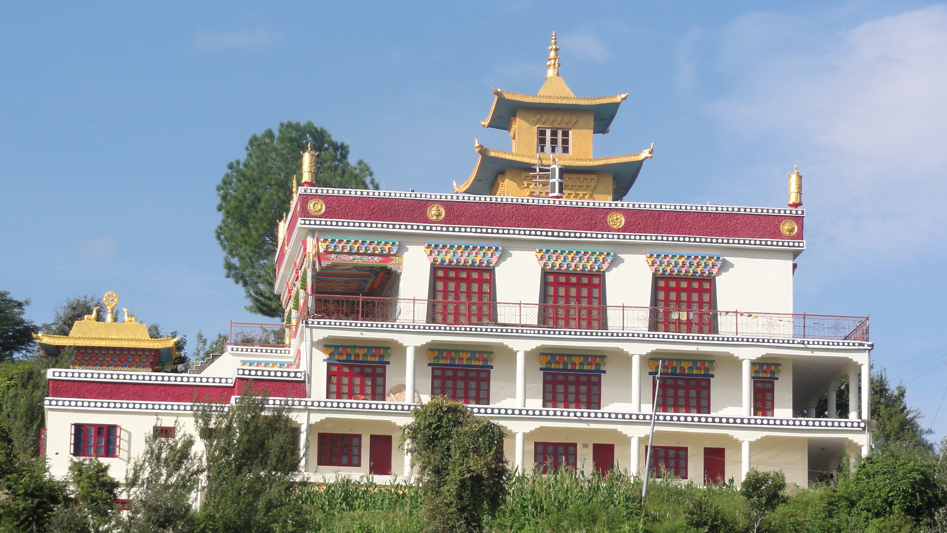 Temple et école de la Félicité